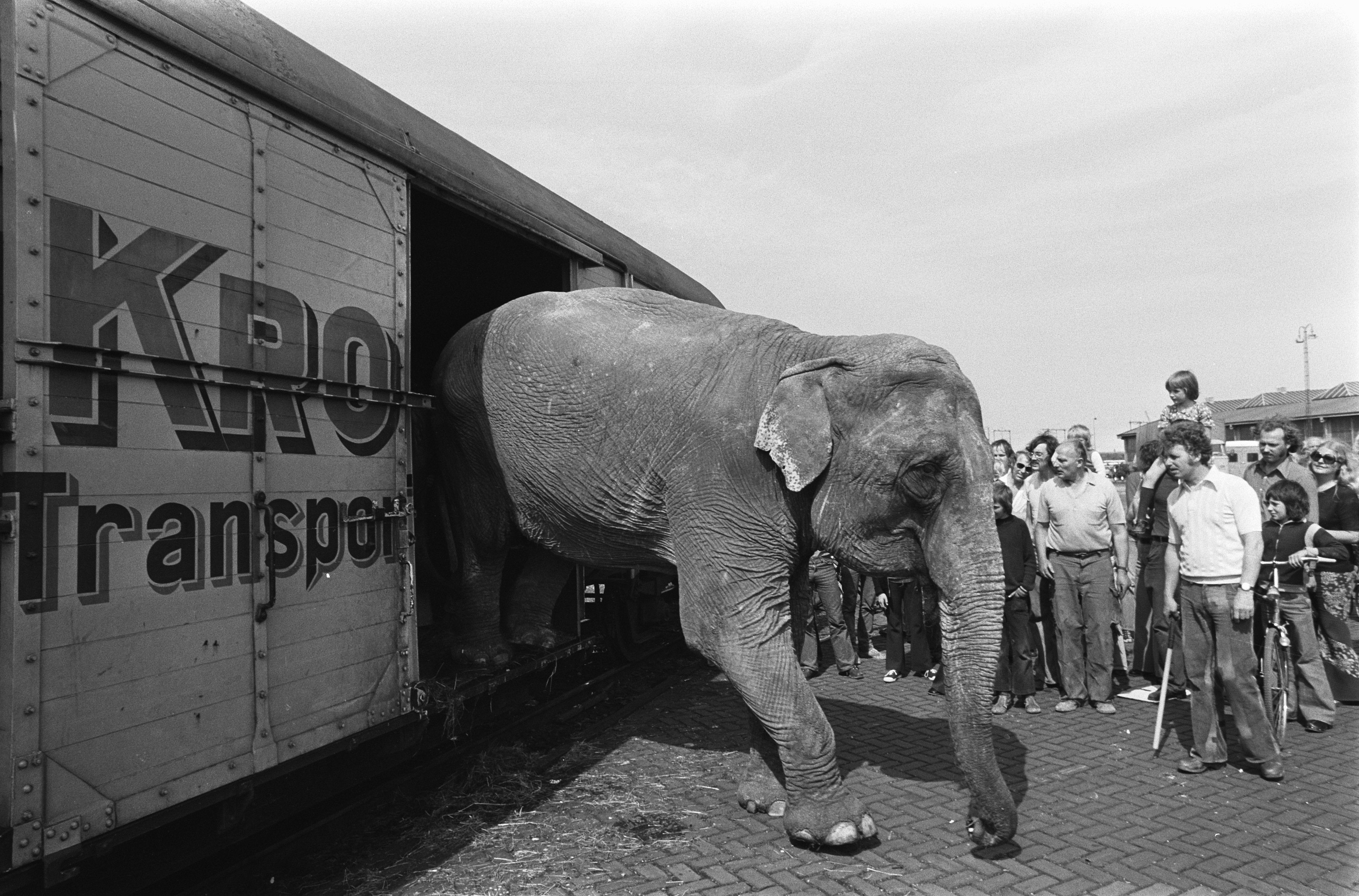 Collectie / Archief : Fotocollectie Anefo Reportage / Serie : Aankomst van Circus Krone in Amsterdam Beschrijving : Olifanten in de trein op de Cruquiuskade Datum : 24 juni 1975 Locatie : Amsterdam, Noord-Holland Trefwoorden : circussen, kinderen, olifanten, treinen Fotograaf : Fotograaf Onbekend / Anefo Auteursrechthebbende : Nationaal Archief Materiaalsoort : Negatief (zwart/wit) Nummer archiefinventaris : bekijk toegang 2.24.01.05 Bestanddeelnummer : 928-0102